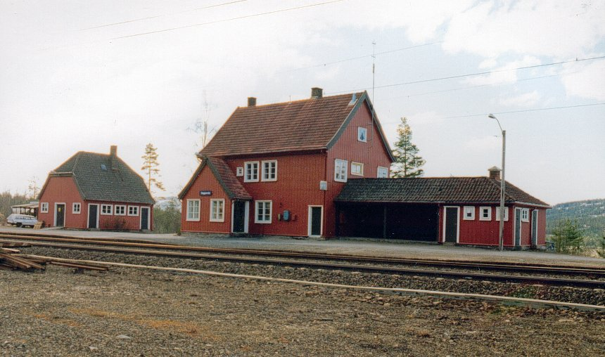 Saggrenda stasjon på Sørlandsbanen